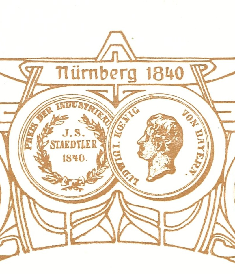 Druck von Vorder- und Rückseite der zur Industrieausstellung in Nürnberg 1840 an die Bleistiftfabrik J.S. Staedtler verliehenen Medaille auf dem Titelblatt der 1898 erschienenen "Preisliste J.S. Staedtler Blei- und Farbstiftfabrik Nürnberg".